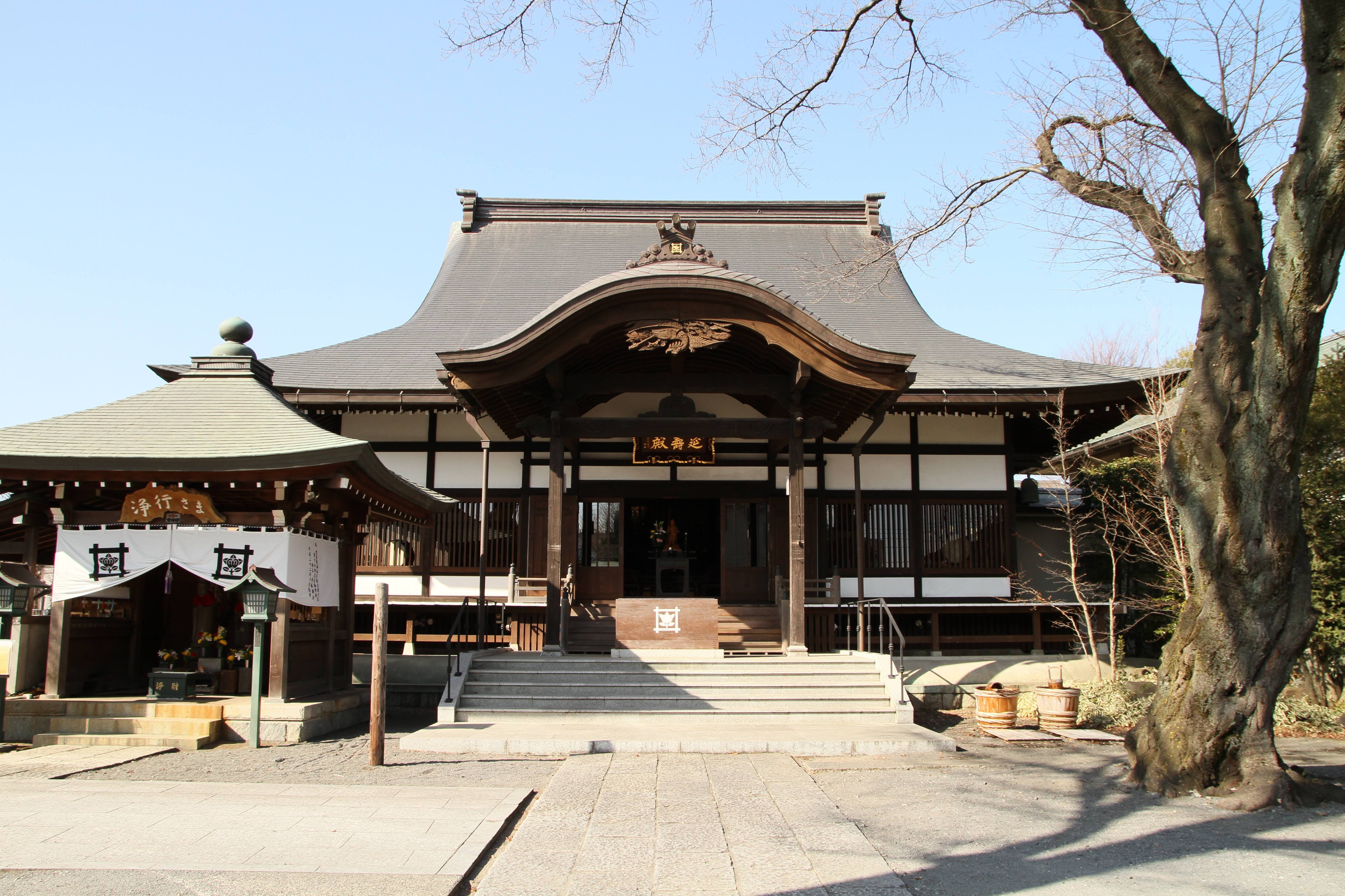 本立寺（八王子市）本堂